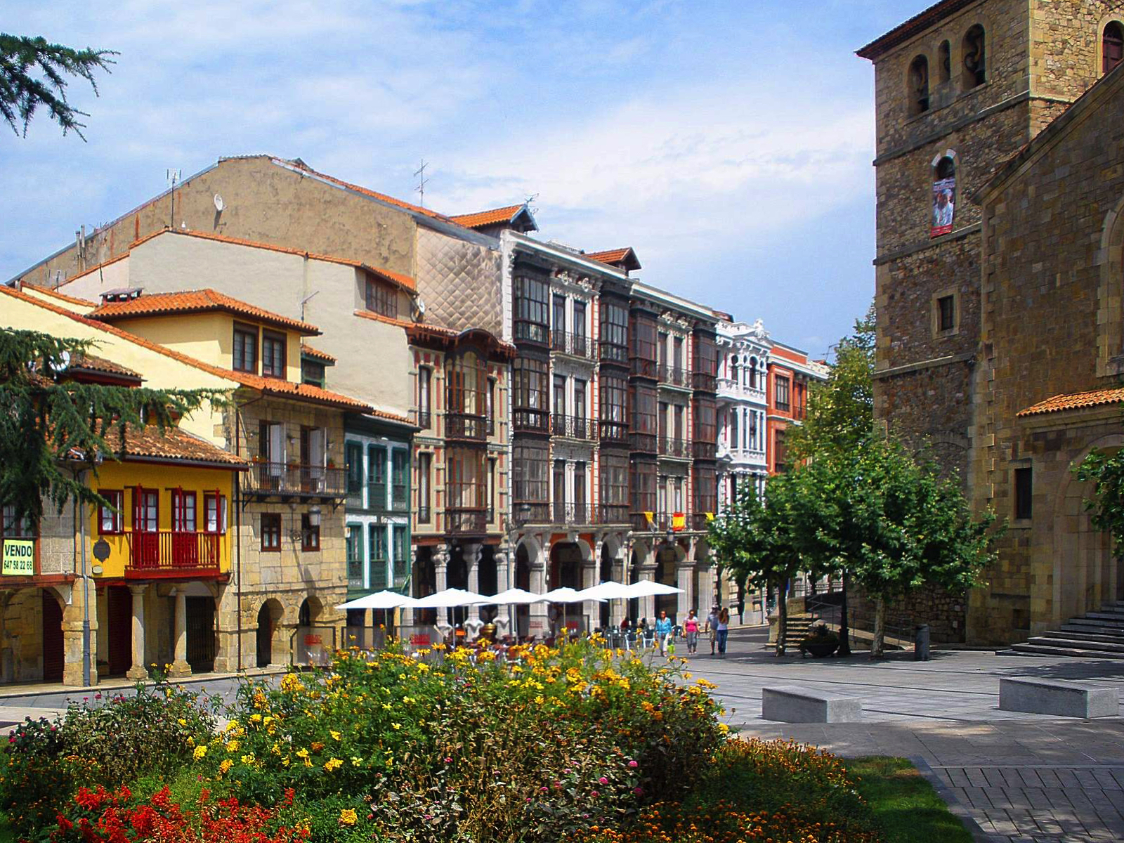 Aviles - Plaza de Domingo Acebal